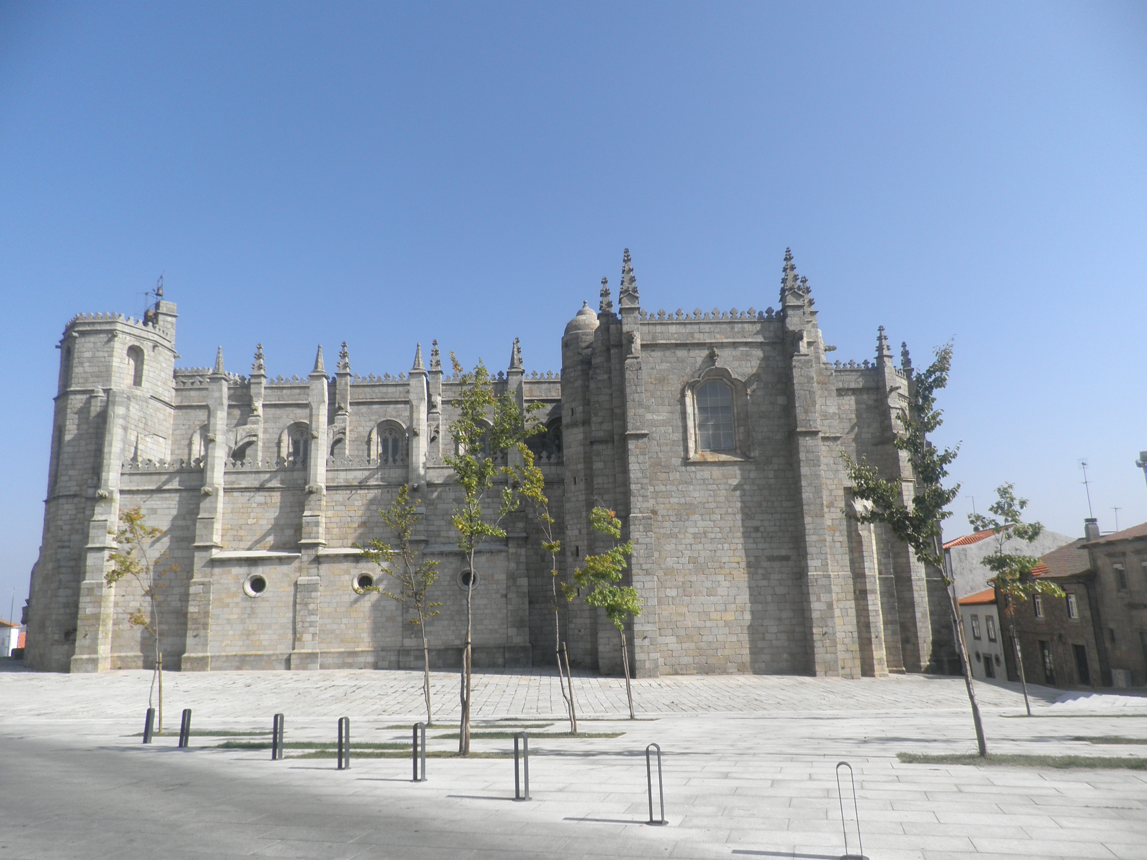 Sé Catedral da Guarda, fachada norte.